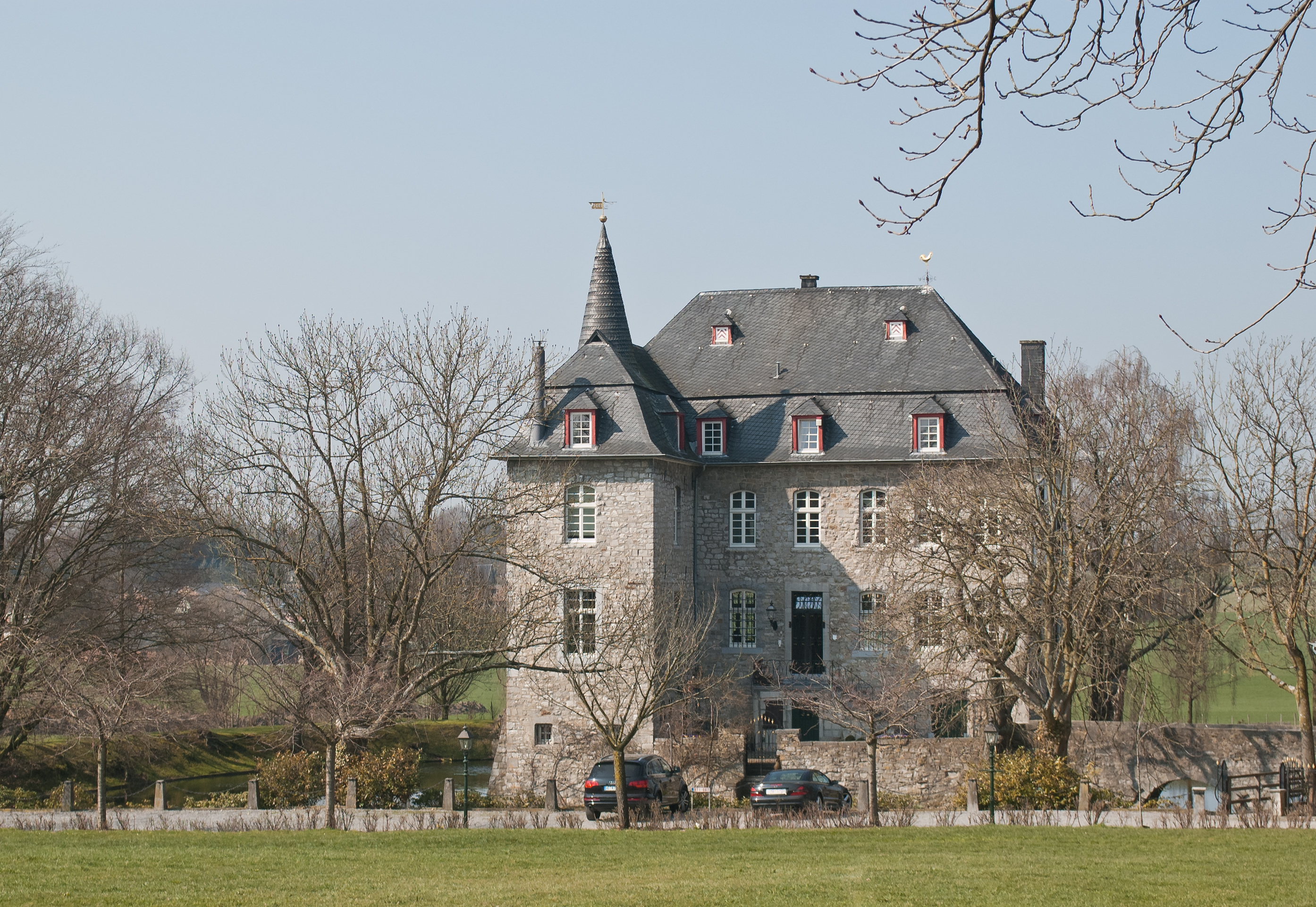 Das Herrenhaus des Schlosses Liberme in Kettenis, gesehen von der Straße aus